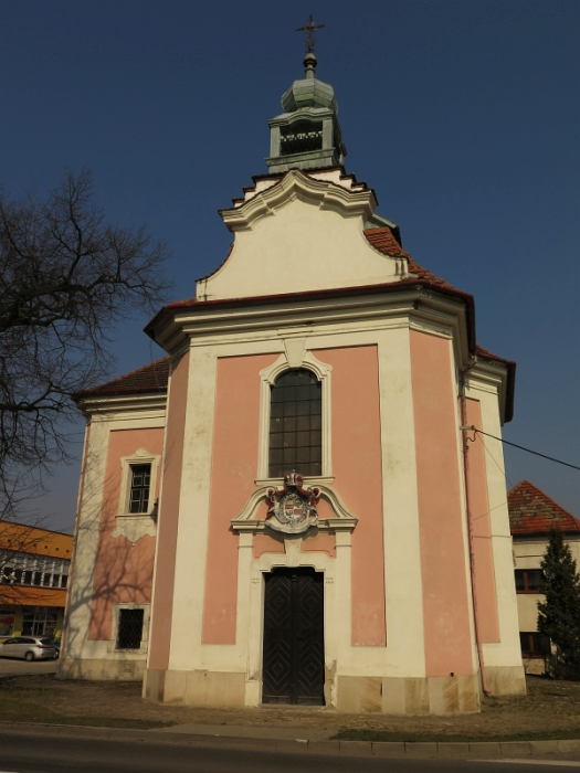 Kostel Nanebevzetí Panny Marie, Hoštka.